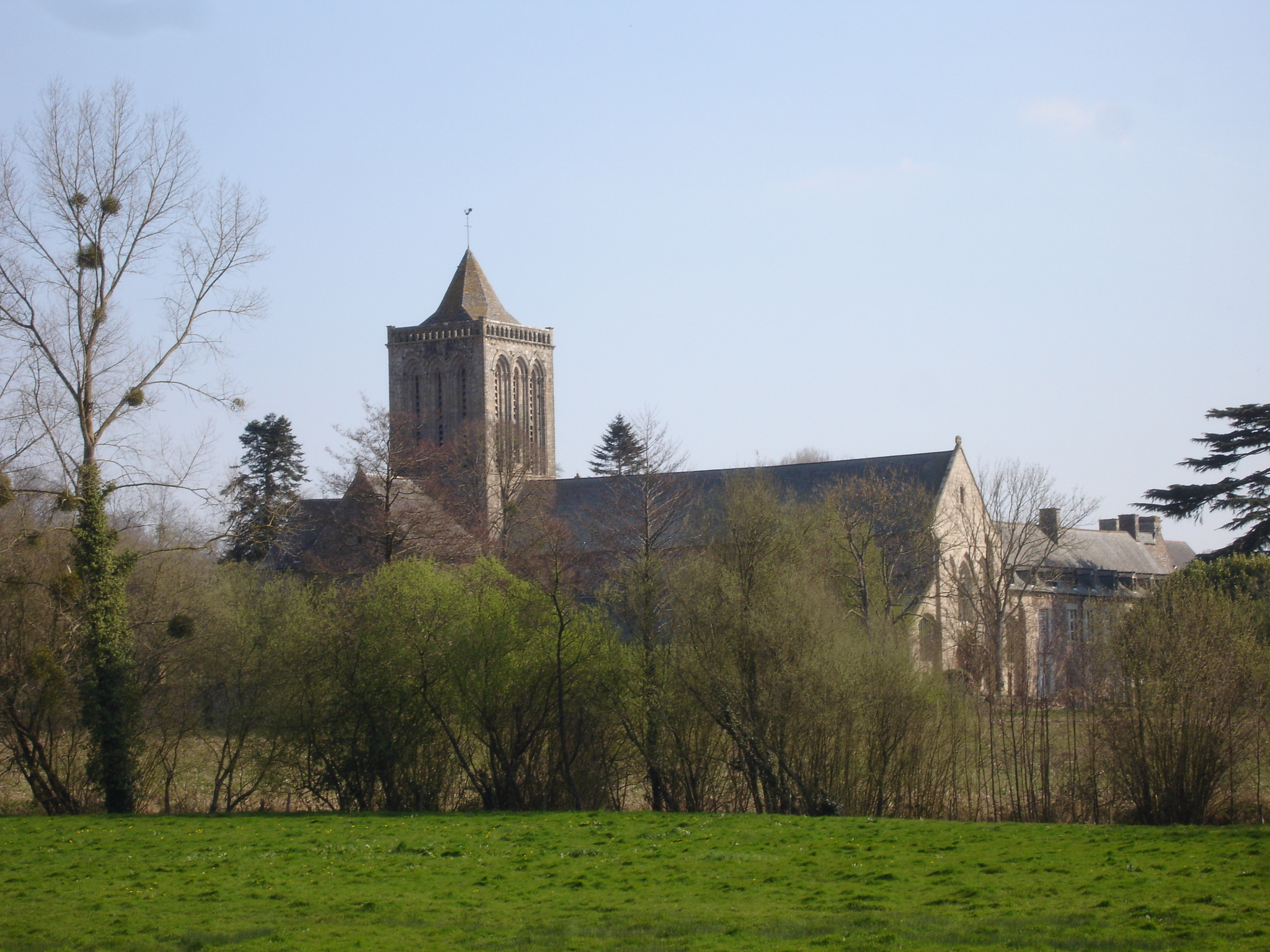 France, Manche (50), Abbaye de la Lucerne d'Outre Mer, vue de loin